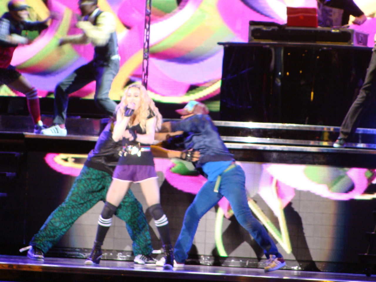 Madonna Day